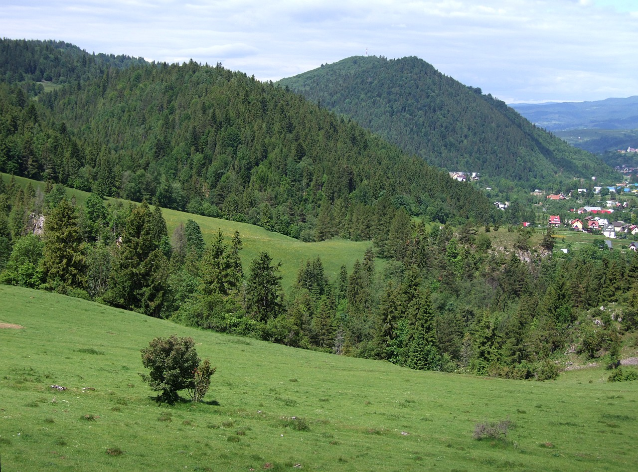 Ubocz, Czuprana i Jarmuta w Małych Pieninach. Widok od wschodniej strony